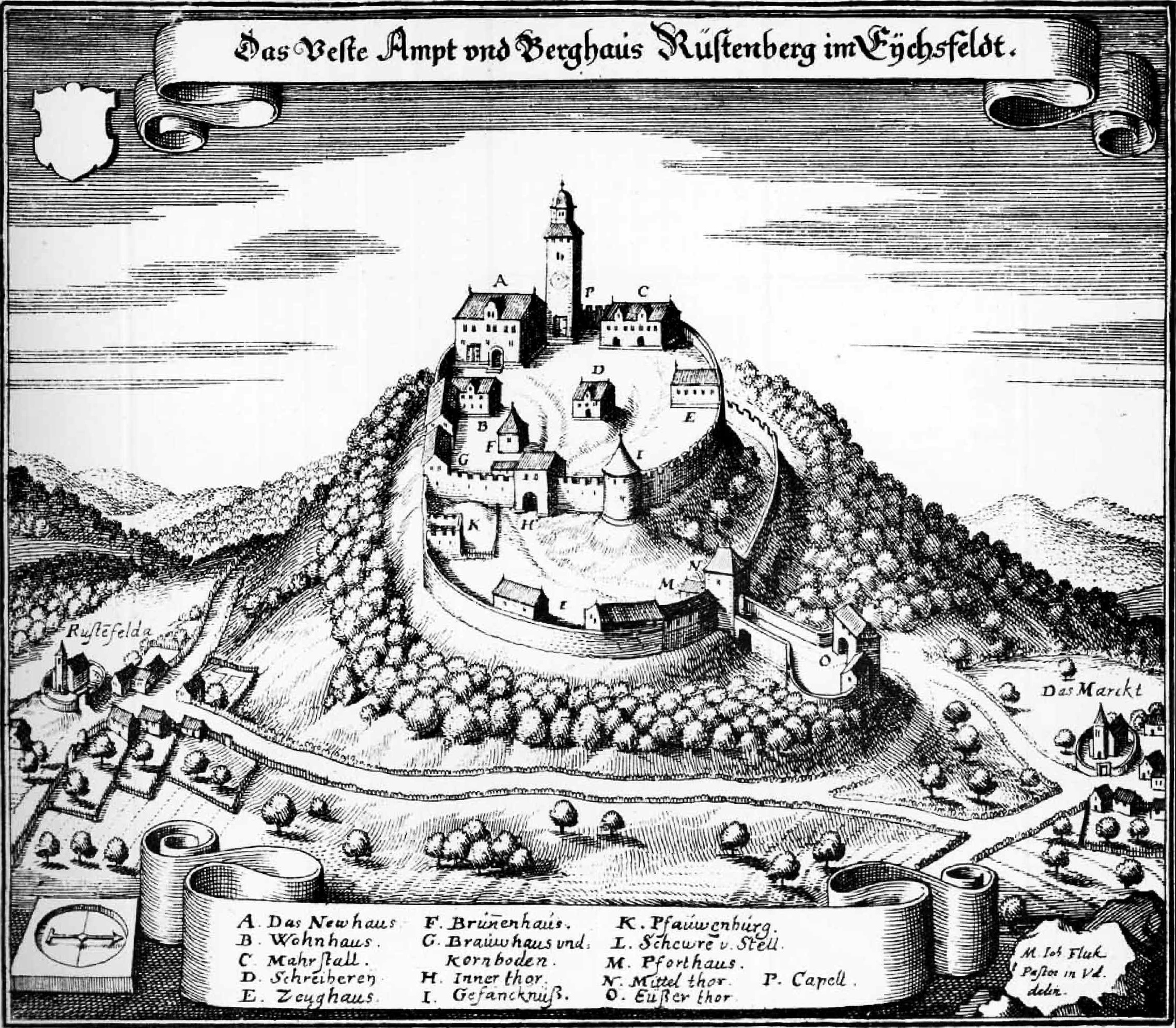 Das Veste Ampt und Berghaus Rüstenberg im Eÿchsfeldt